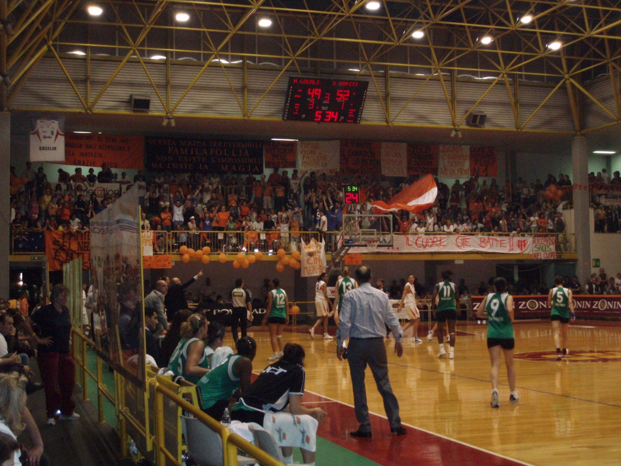 Tifoseria Famila Schio